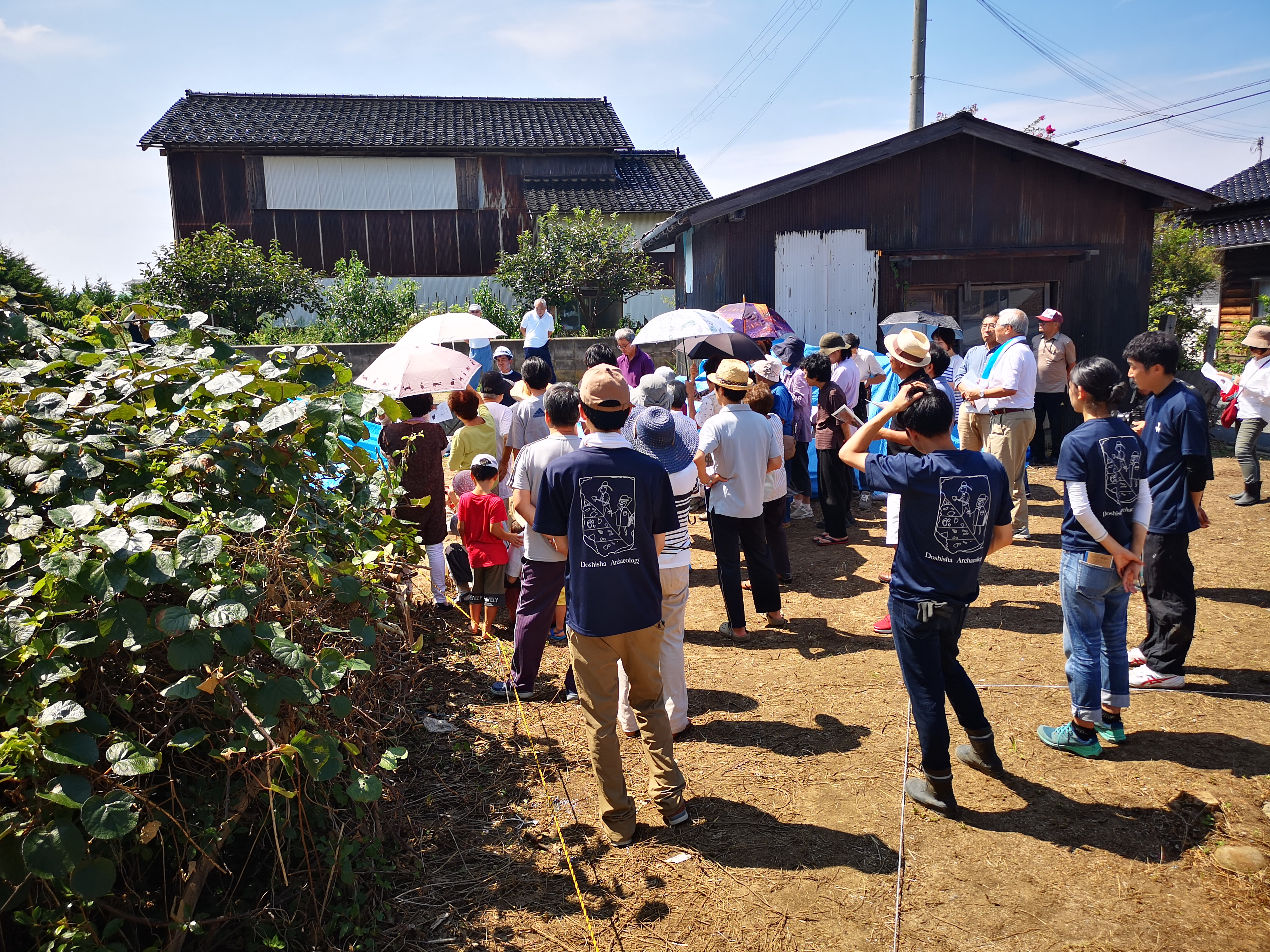 京丹後市網野町浜詰に所在する縄文遺跡「浜詰遺跡」で2019年８月31日に行われた発掘調査見学会。同志社大学の調査による。